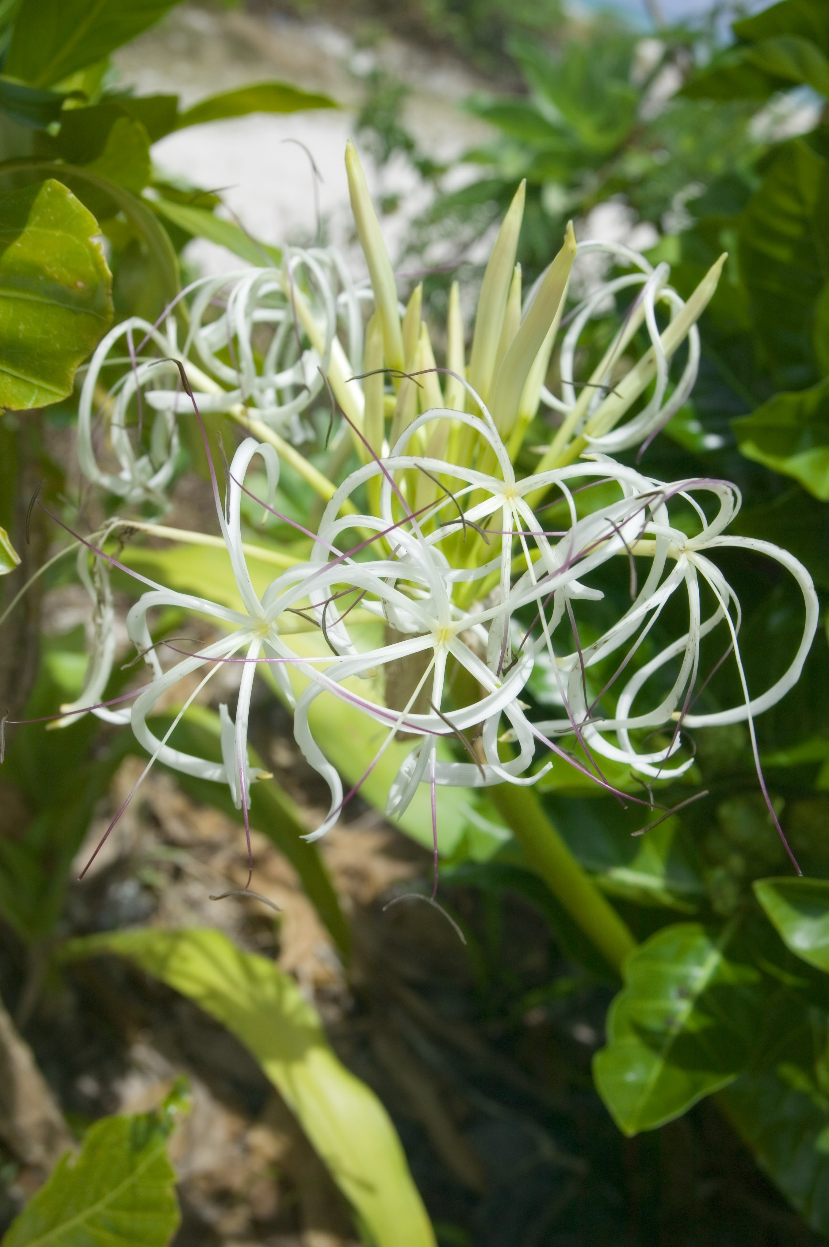 Crinum asiaticum var. japonicum